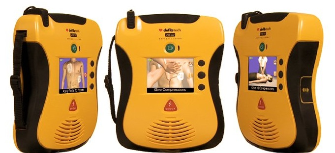 Automatic External Defibbrillator